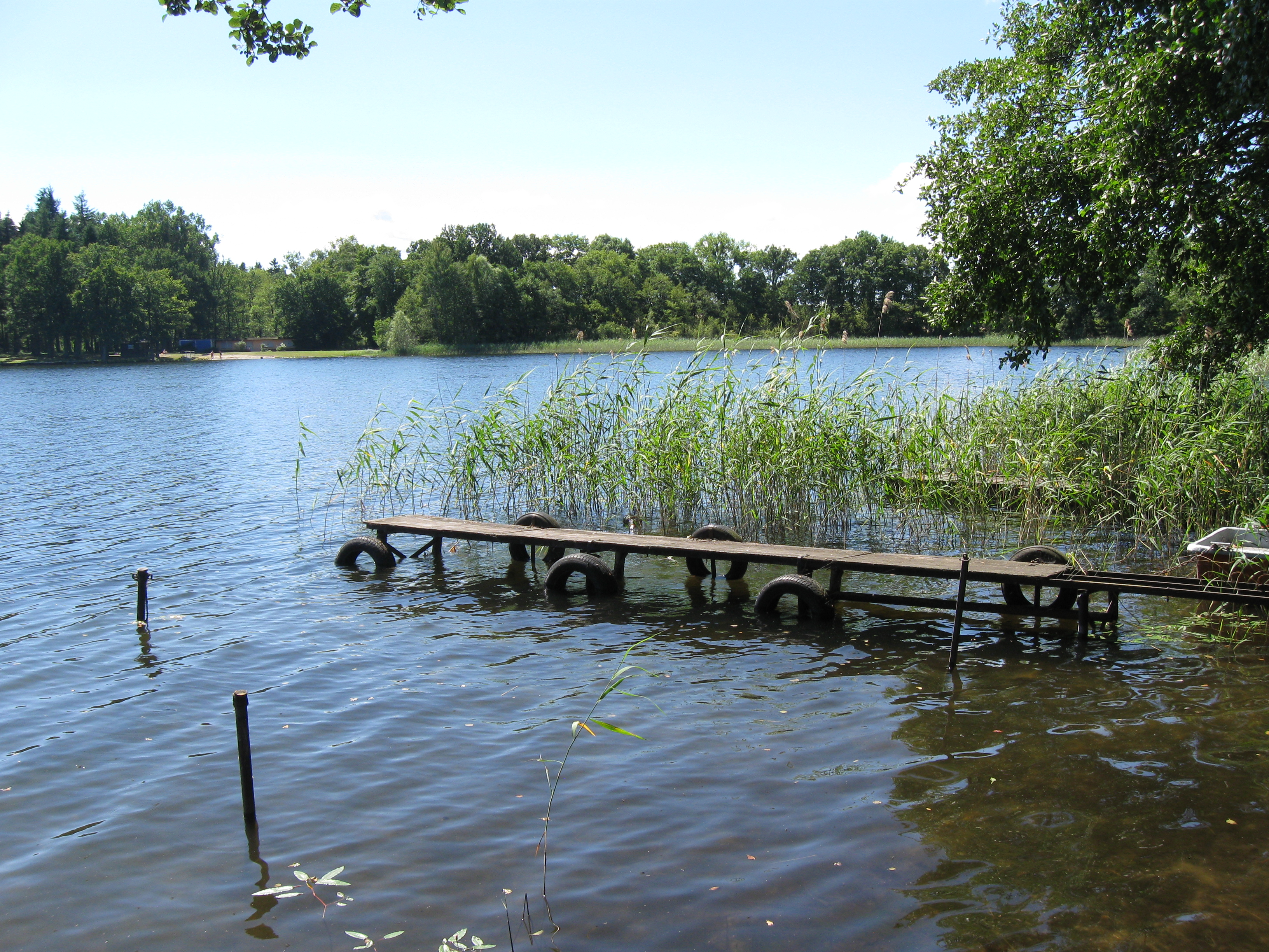 Nordwestlicher Uferbereich des Großen Pinnower Sees mit Steg. Im Hintergrund das offen gelassene Strandbad am See.